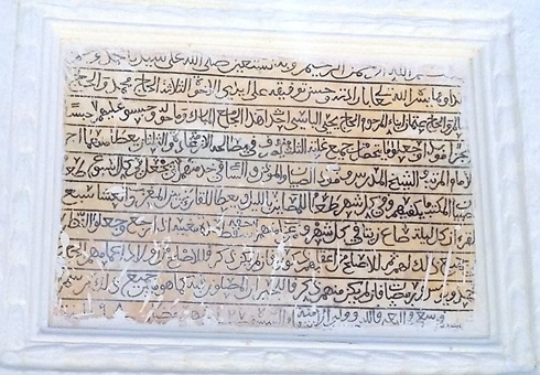 djerba